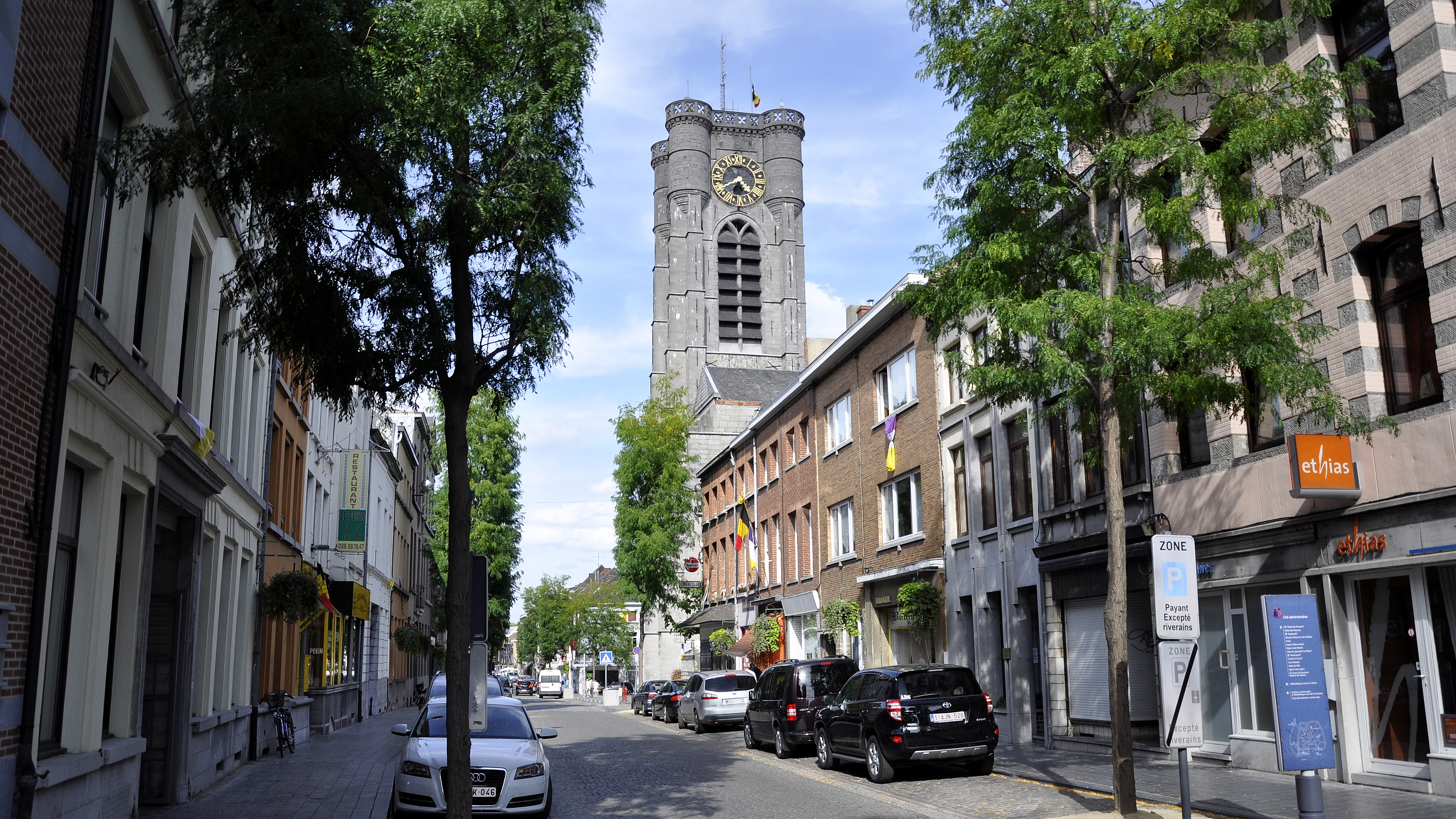 De Sint-Julianuskerk te Aat, België